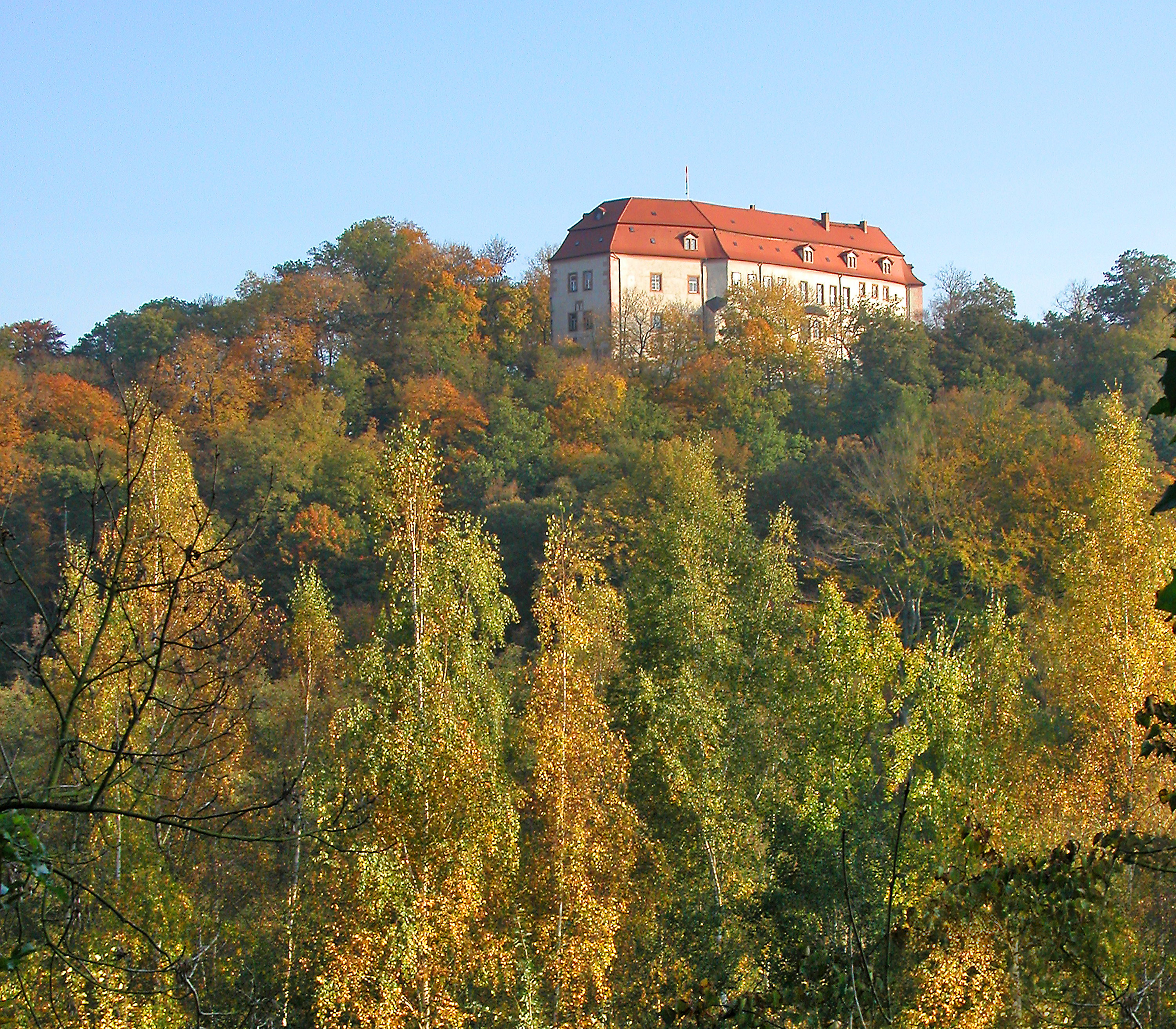 16.10.2007 09212 Wolkenburg Mulde, (Limbach-Oberfrohna), Schloss 3 (GMP: 50.902292,12.673930): Hoch über dem Tal der Zwickauer Mulde liegt Schloß Wolkenburg, im Kern verm. 13. Jh., im 18 Jh. stark verändert. Von 1635 bis zur Bodenreform 1945 im Besitz der Familie von Einsiedel. In der DDR für Wohnungen, die Schulspeisung und für katholische Gottesdienste genutzt. Seit 2000 im städtischen Besitz. Öffentlich zugänglich. [DSCN30708.TIF]20071016005DR.JPG(c)Blobelt